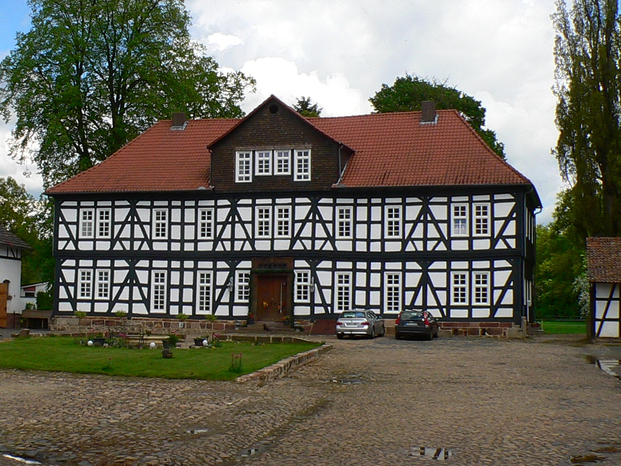 Unterhof Gilsa in Neuental-Gilsa, Hessen, Regierungsbezirk Kassel, Schwalm-Eder-Kreis